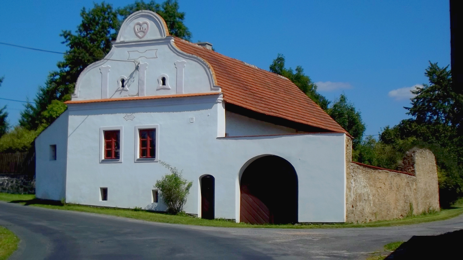 Opravená chalupa u silnice v Holkovicích.